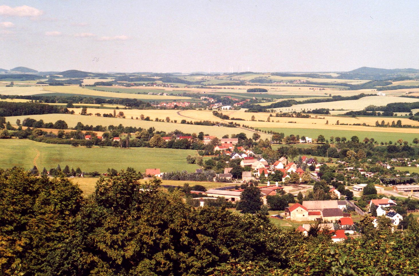 Cottaer Spitzberg: Blick vom Gipfel über Cotta nach Westen